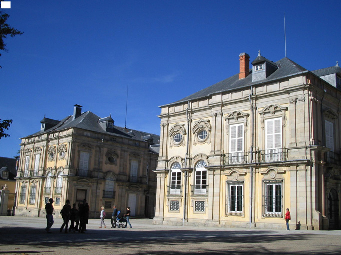 La Granja